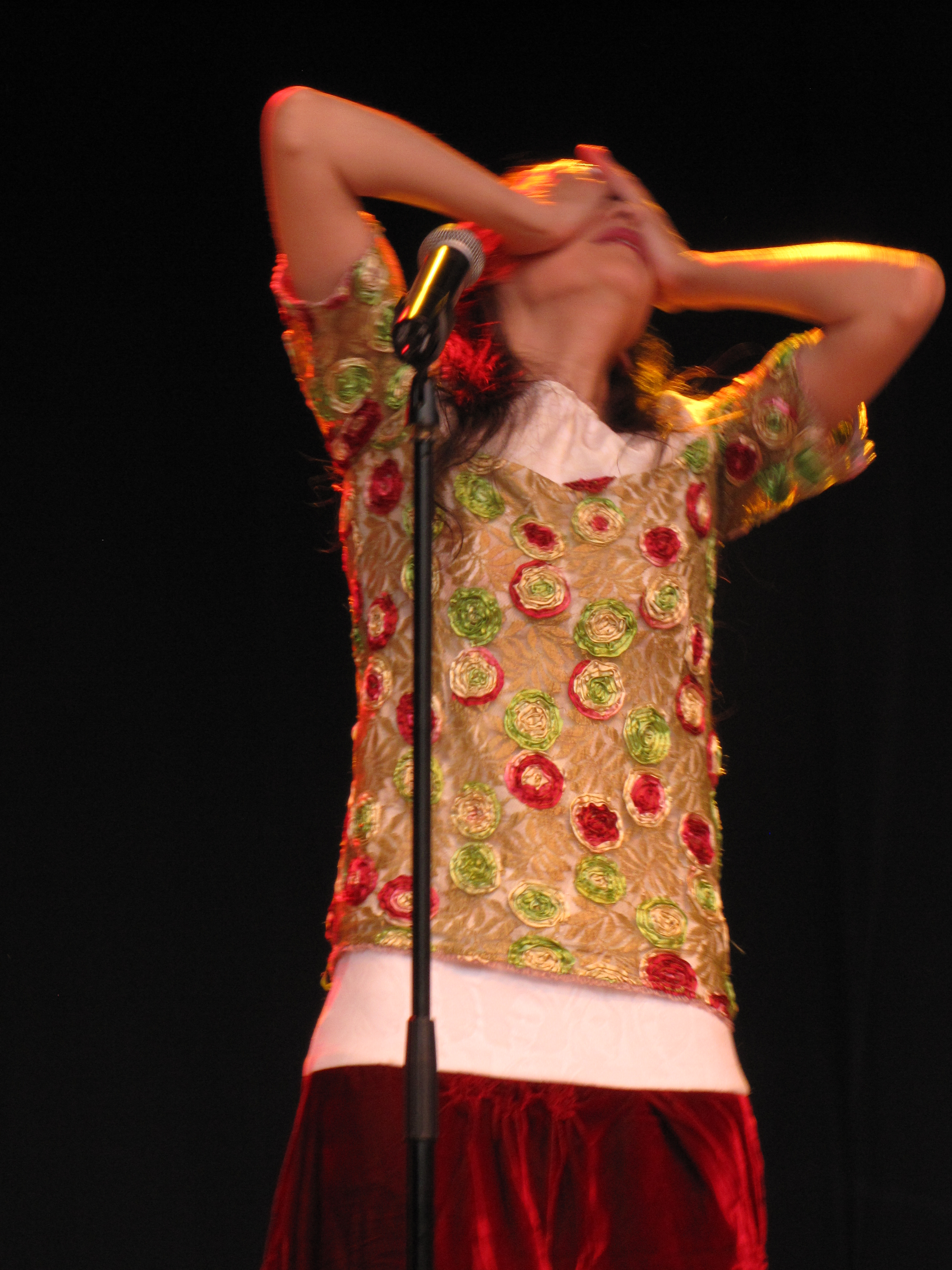 Amélie-les-Crayons, spectacle « La porte plume » à la Fête de Lutte Ouvrière 2009 (Presles, Val d'Oise).